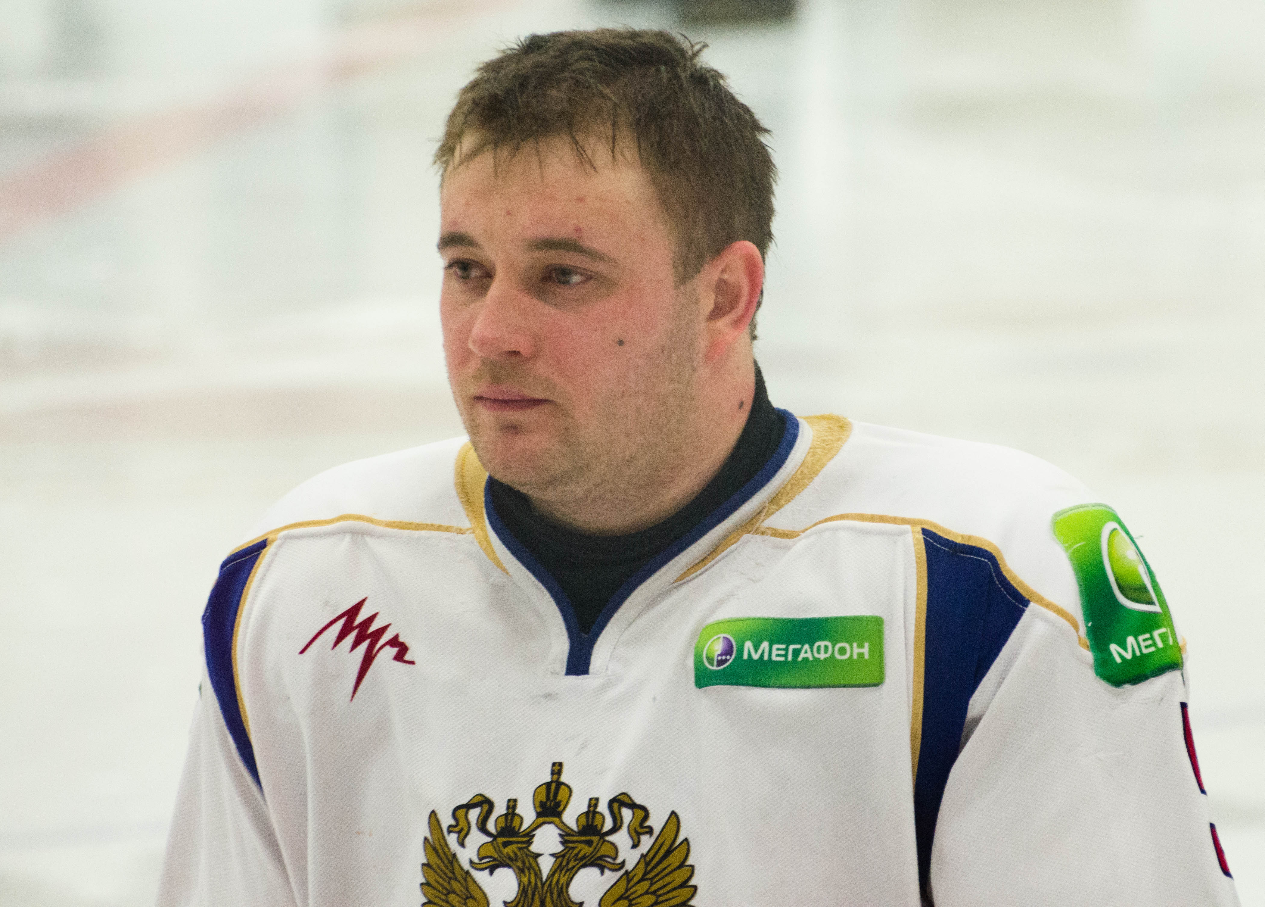 Vasily Varlakov, 2015